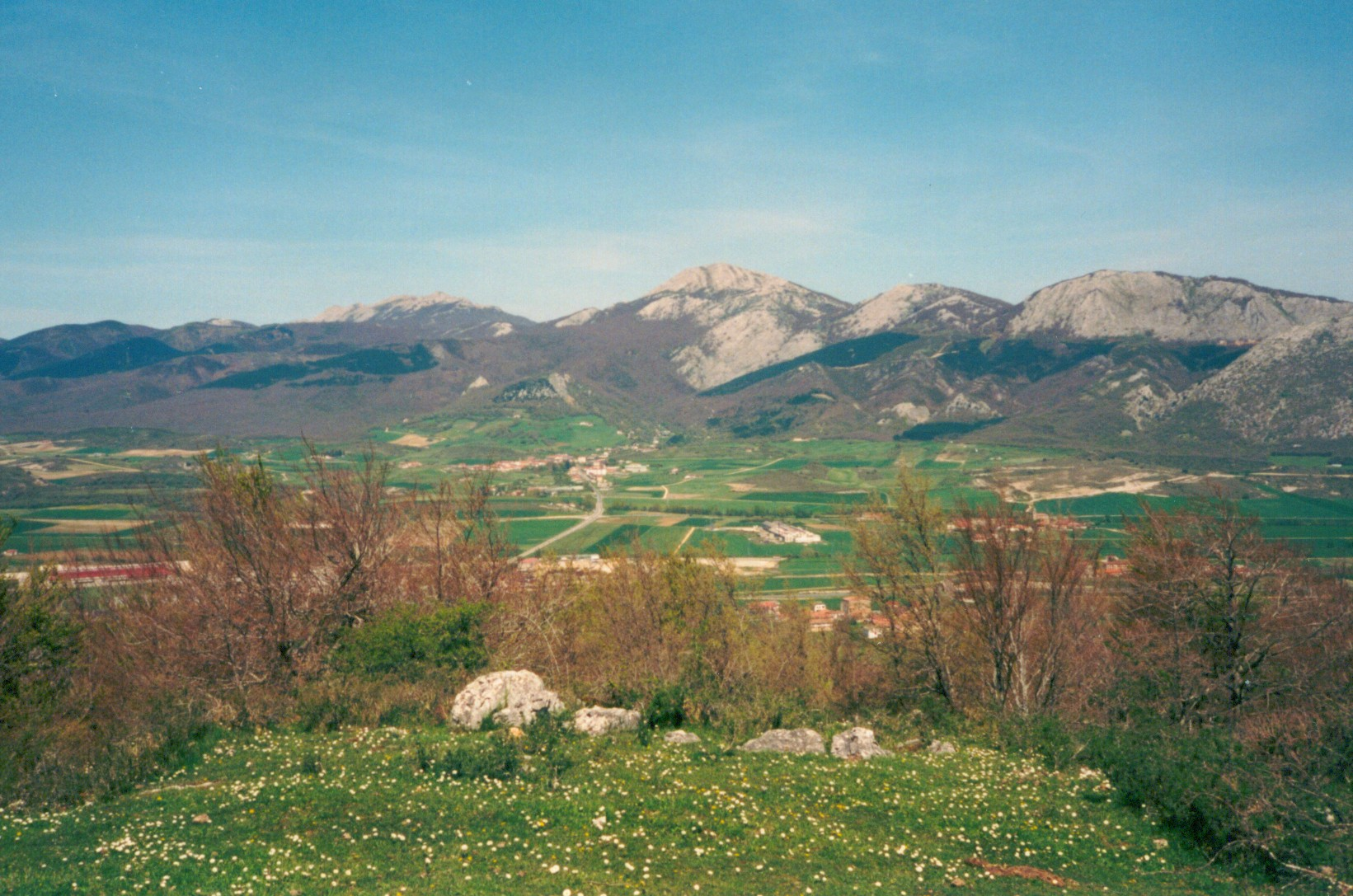 Monte Aratz, Sierra de Altzania y Llanada Alavesa desde la subida del monte Ballo en la provincia Álava en España. Taken by myself, 2001 --Ardo Beltz 17:45, 6 Apr 2005 (UTC)